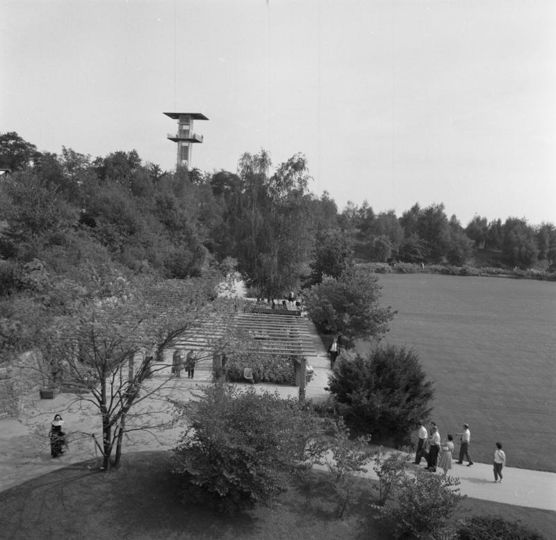 Bundesgartenschau 1961 Stuttgart 11.-16.9.1961